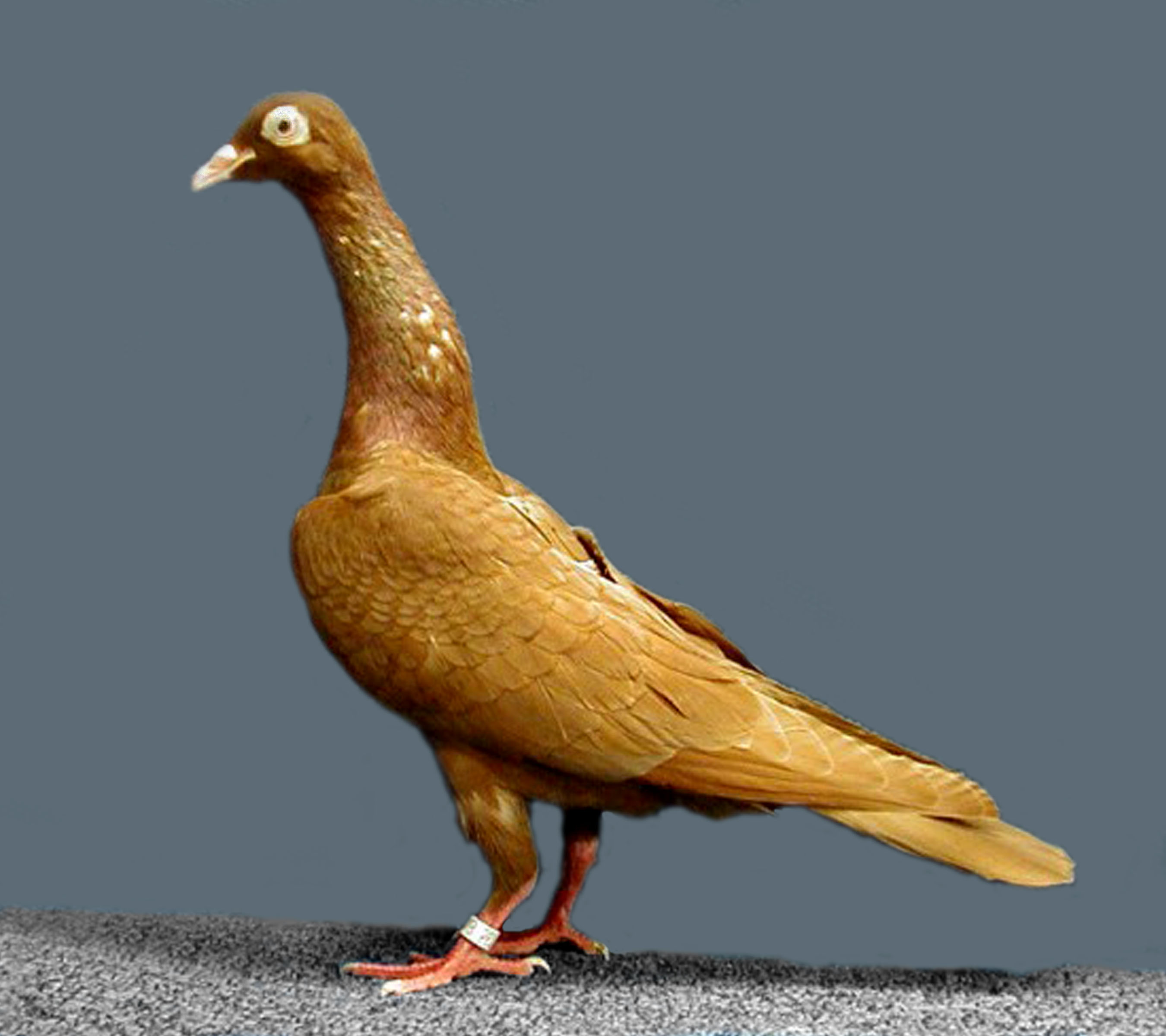 Yellow Stargard Shaker (Zitterhall)